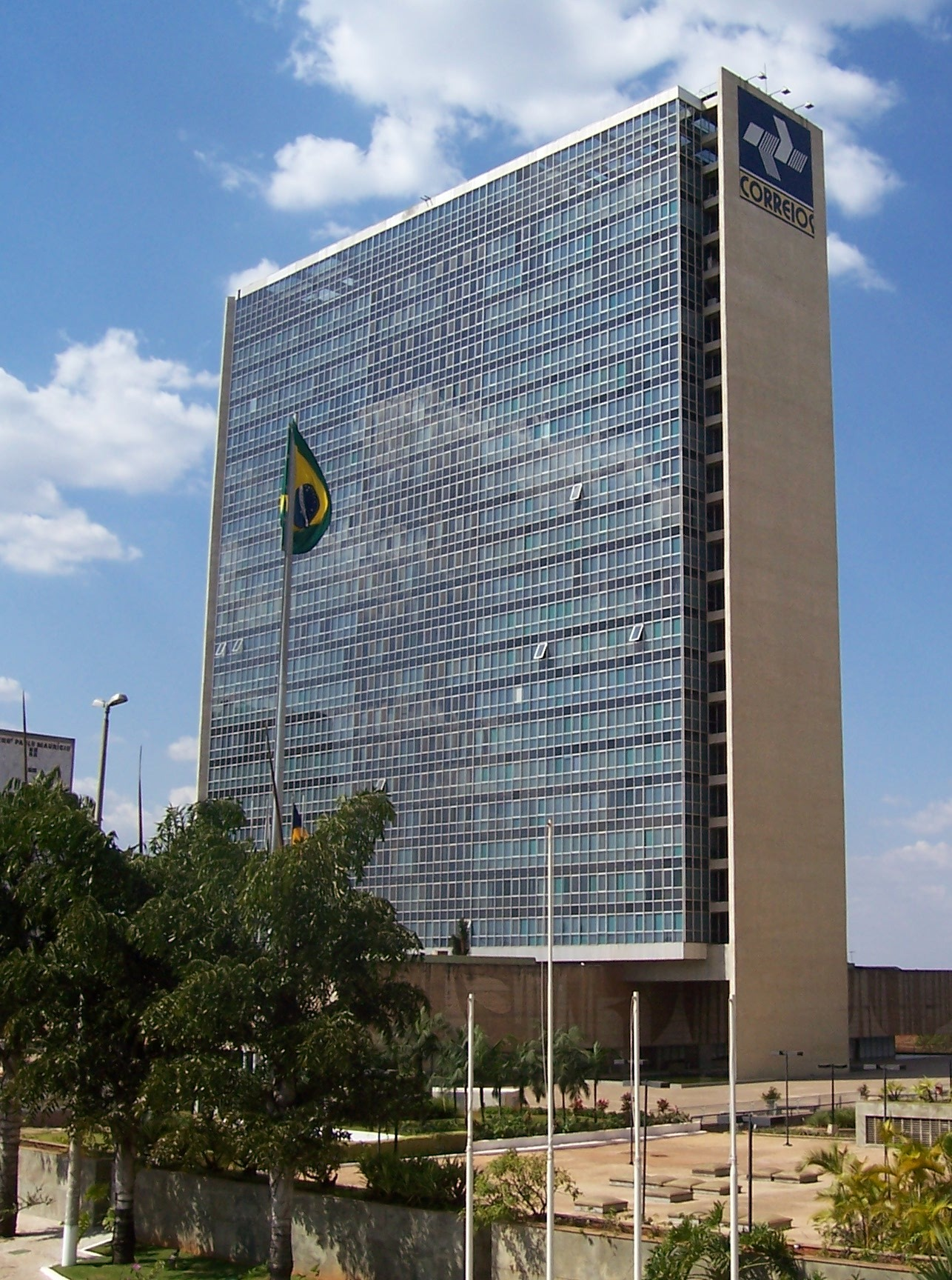 Edifício sede dos Correios, tirada por mim mesmo em 29 de julho de 2006.